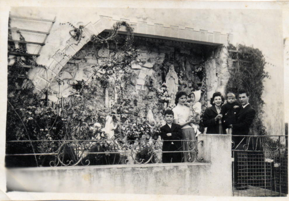 Capela de Nossa Senhora no Alto do Paraguaçu, Itaiópolis